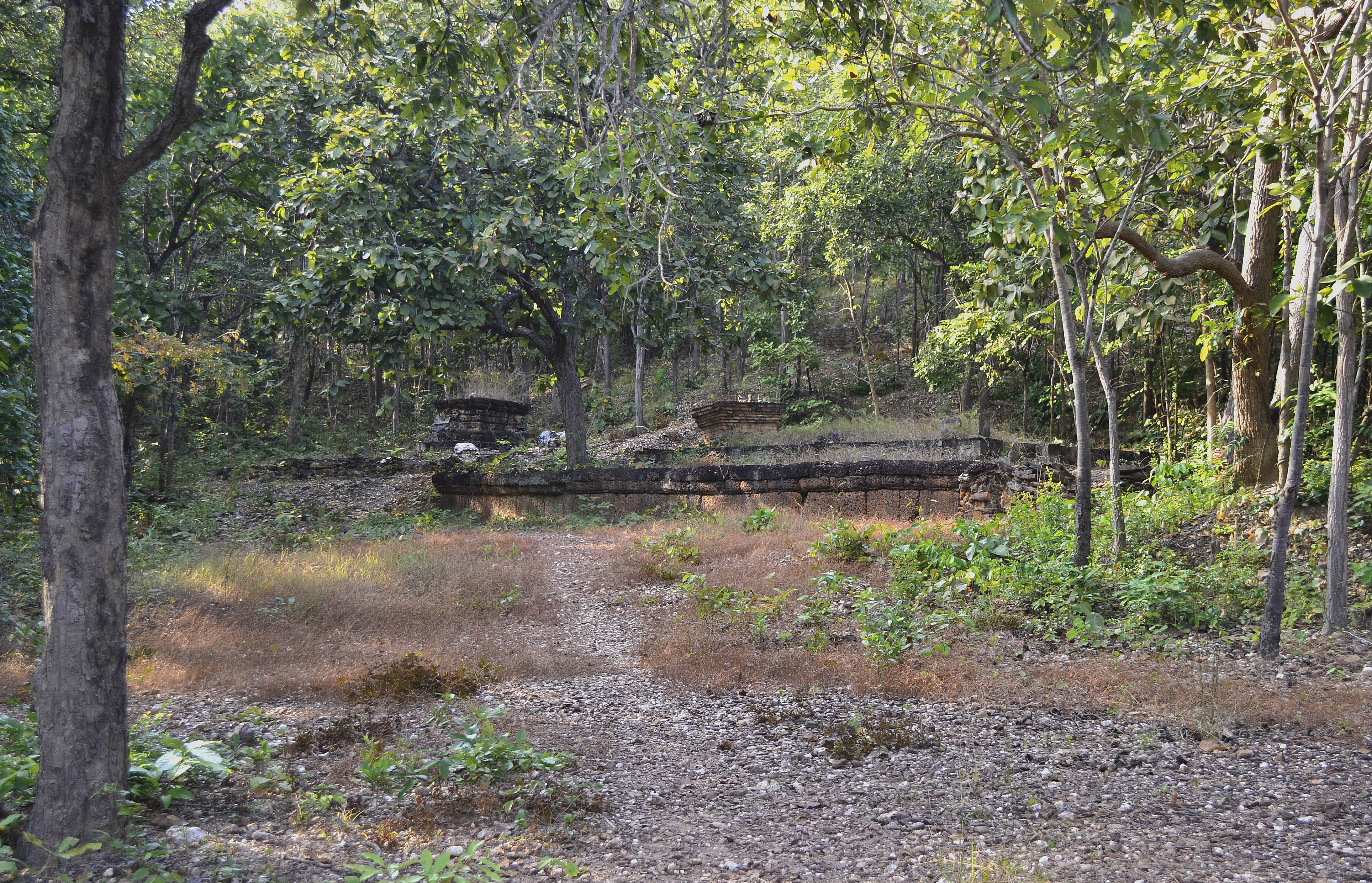 Wat Aranyik im Geschichtspark Sukhothai